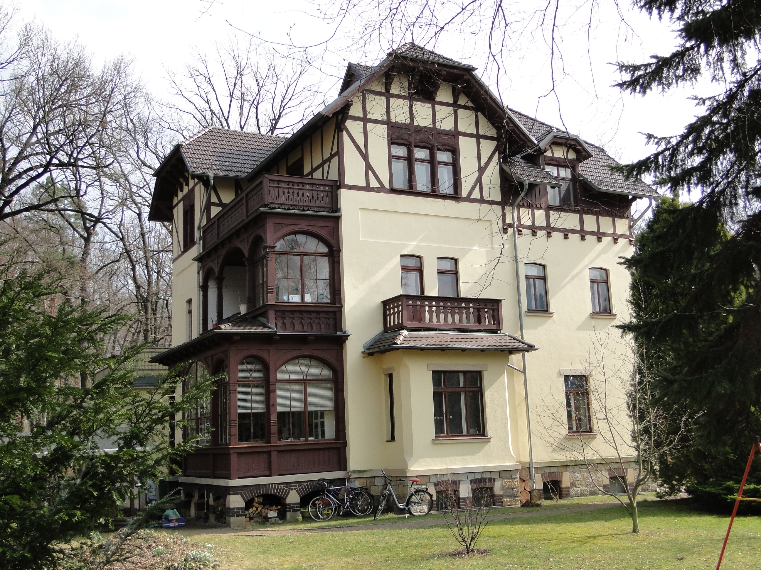 Händelallee 3, Dresden